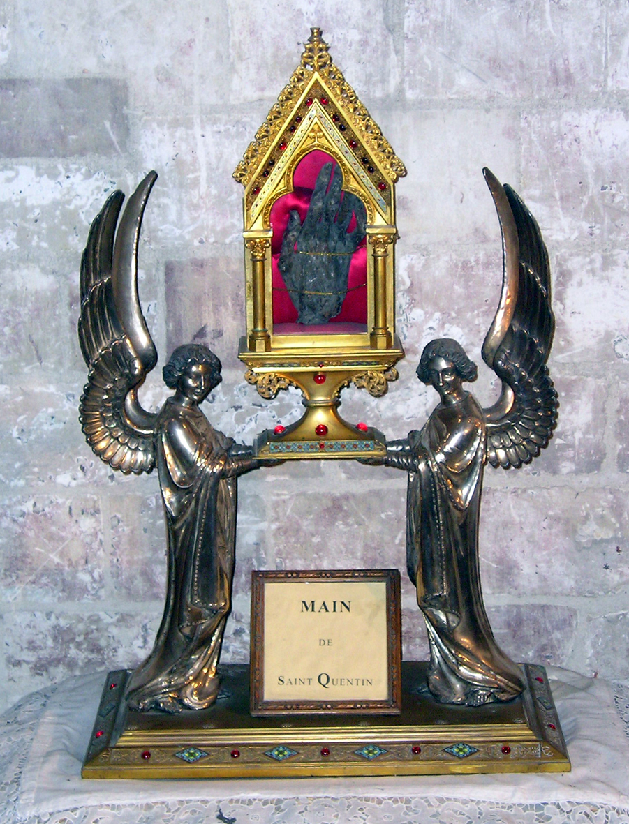 Le reliquaire de la main de saint Quentin tel qu'on peut le voir dans la basilique de Saint-Quentin. Contents 1 Auteur 2 Licensing 3 Licensing 4 Original upload log Auteur Photographie personnelle prise et mise en ligne par Frikar. Licensing Quentin